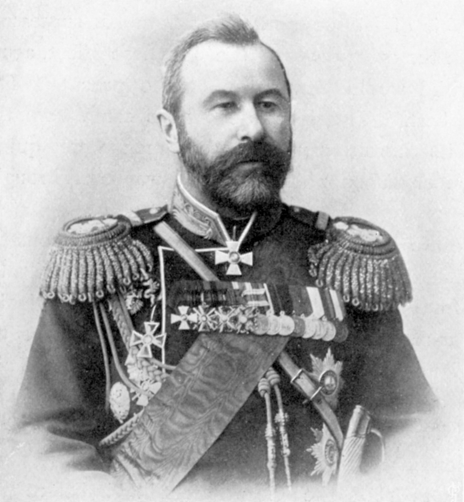 Aleksei Nikolaevich Kuropatkin(Алексей Николаевич Куропаткин),Russian General (b.1848-d.1925)